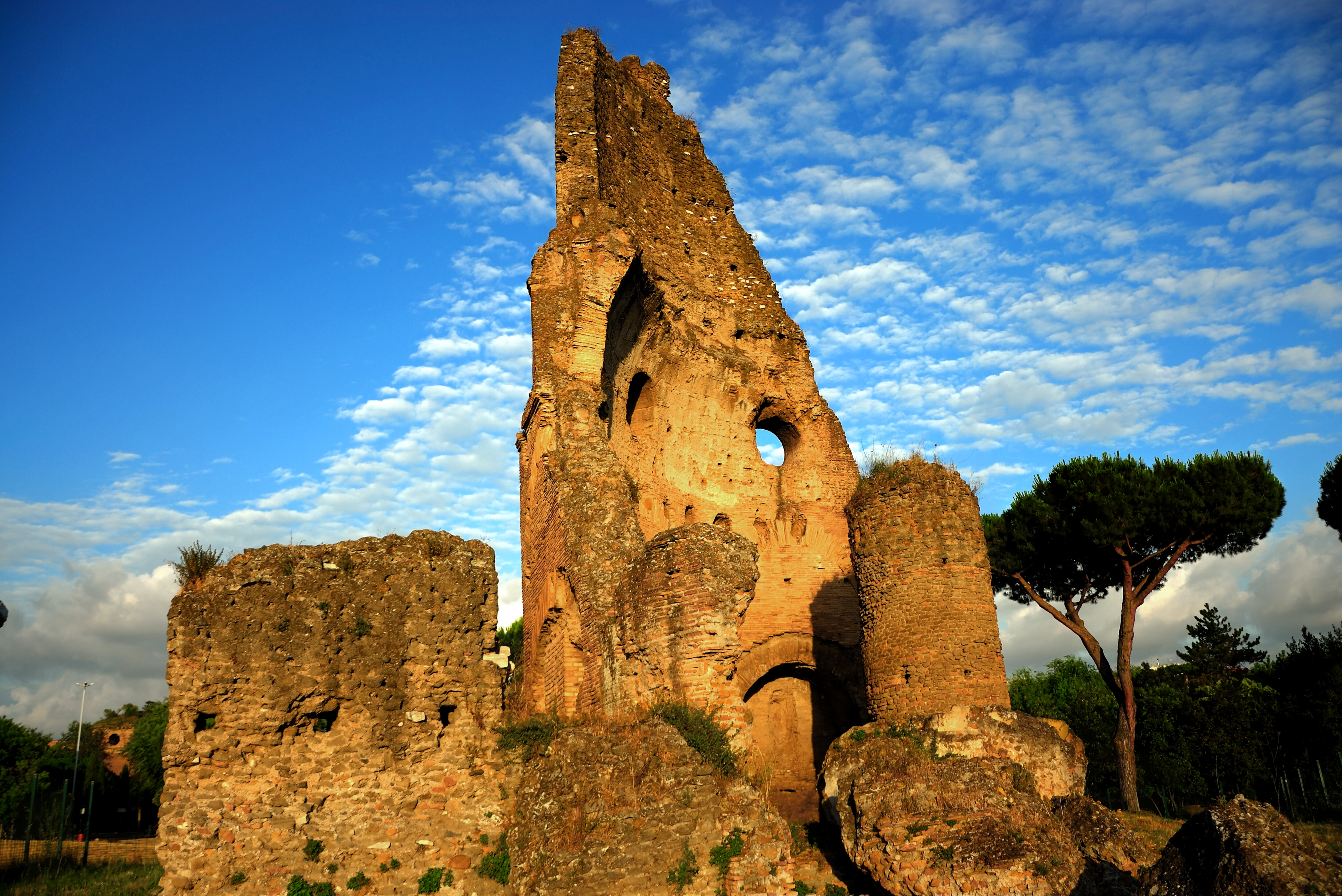 Villa Gordiani This is a photo of a monument which is part of cultural heritage of Italy.